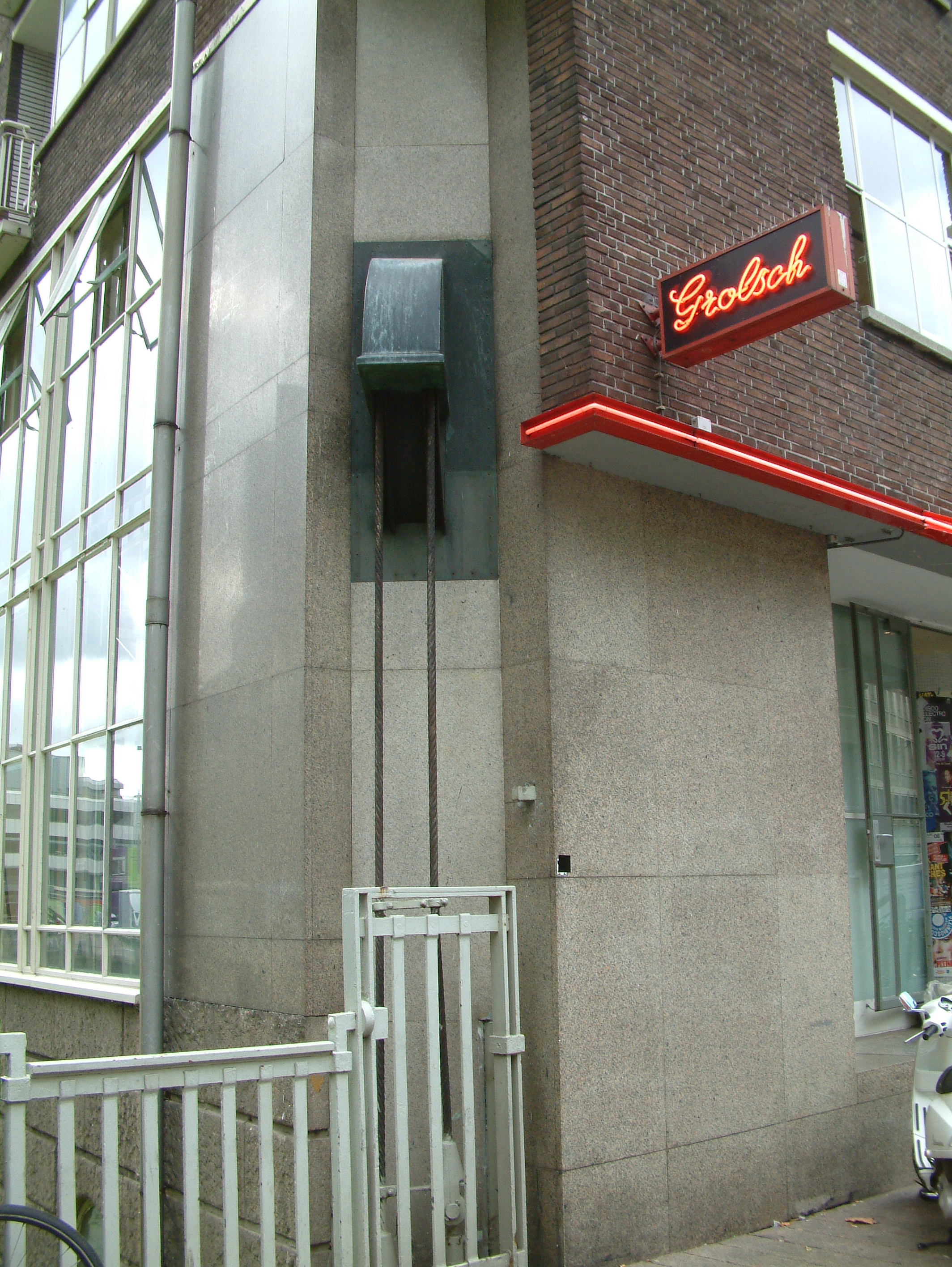 Het ingebouwde hoektorentje aan de zuid-west kant van de Meentbrug